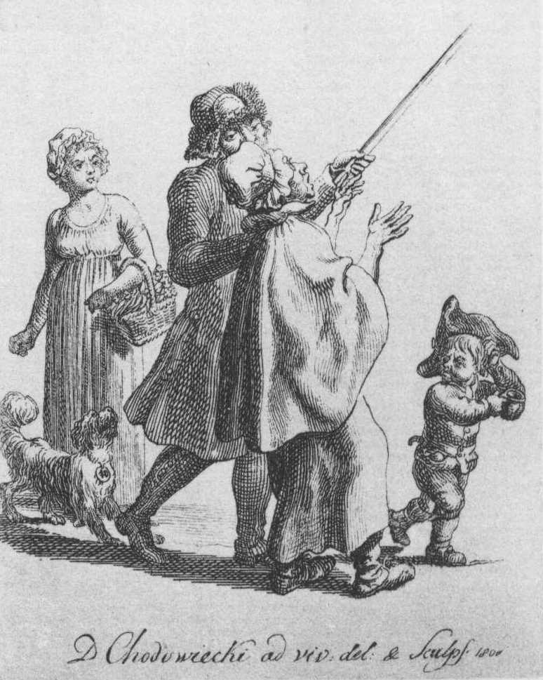 Der Bettelvogt. Er führt mit aufgehobenem Stocke ein altes wehklagendes Weib fort; voran läuft ein Betteljunge mit dreieckigem Hute, er hält in der Hand ein Töpfchen und kratzt sich mit der linken hinter dem Hute. Links steht ein Dienstmädchen mit einem Korb im Arm, welches die rechte Hand ballend, mit Erbitterung der Scene zuschaut. (Beschreibung lt. Quelle)